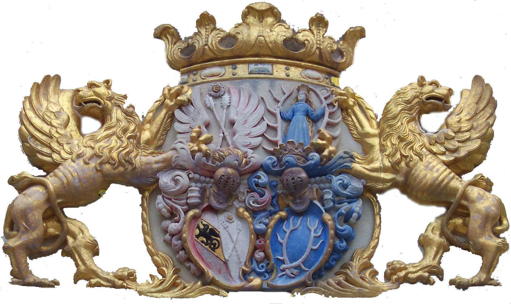 Doppelwappen der Familien von Callenberg (links) und von Dohna (rechts) am alten Schloss in Bad Muskau